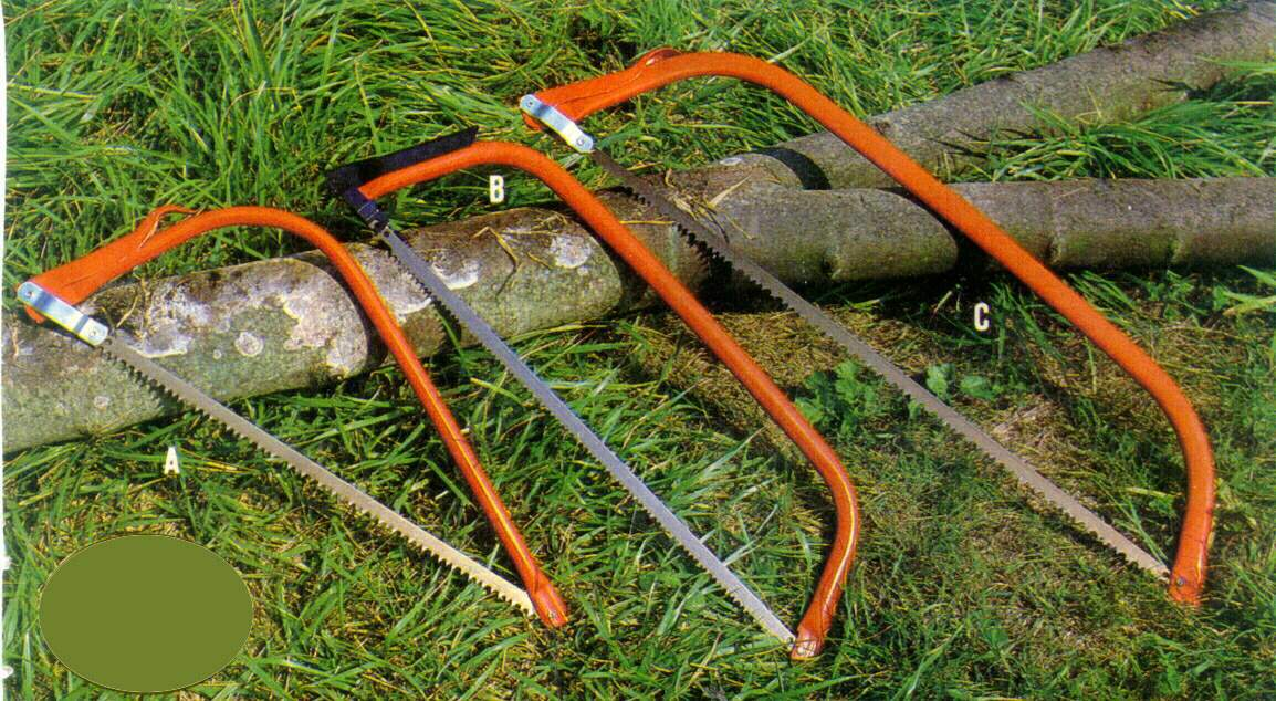 Trois scies à bûches.